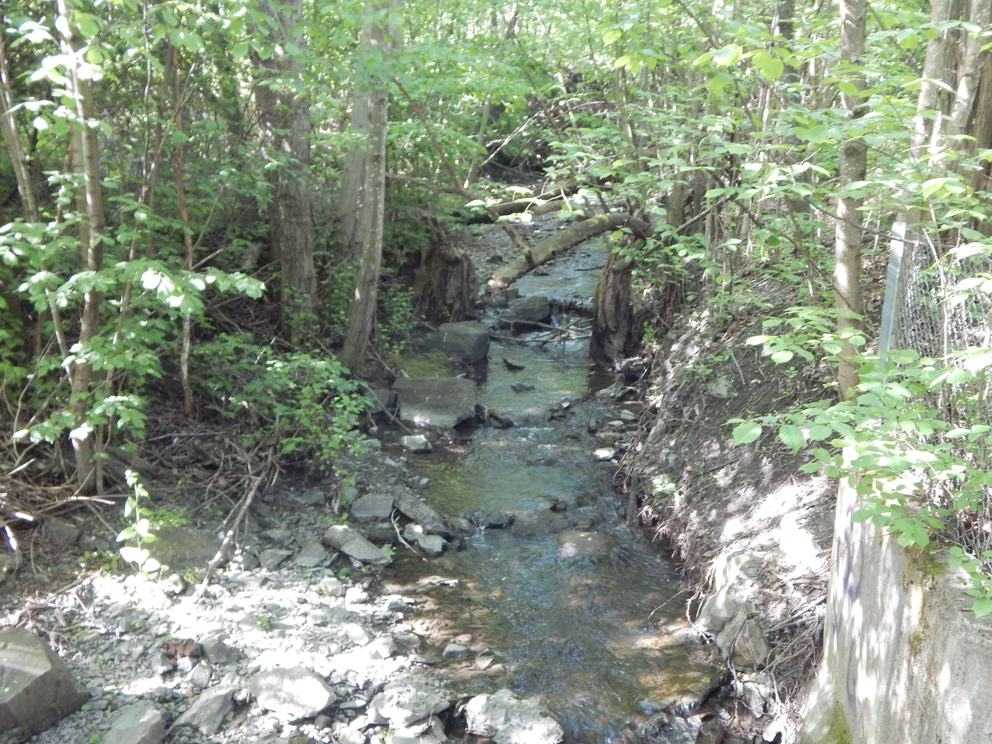 Makrellbekken like over Jarlsborgveien